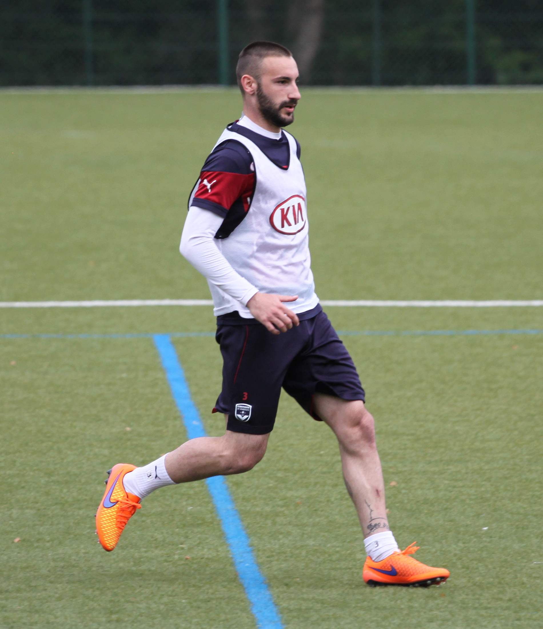 Contento à l'entraînement.